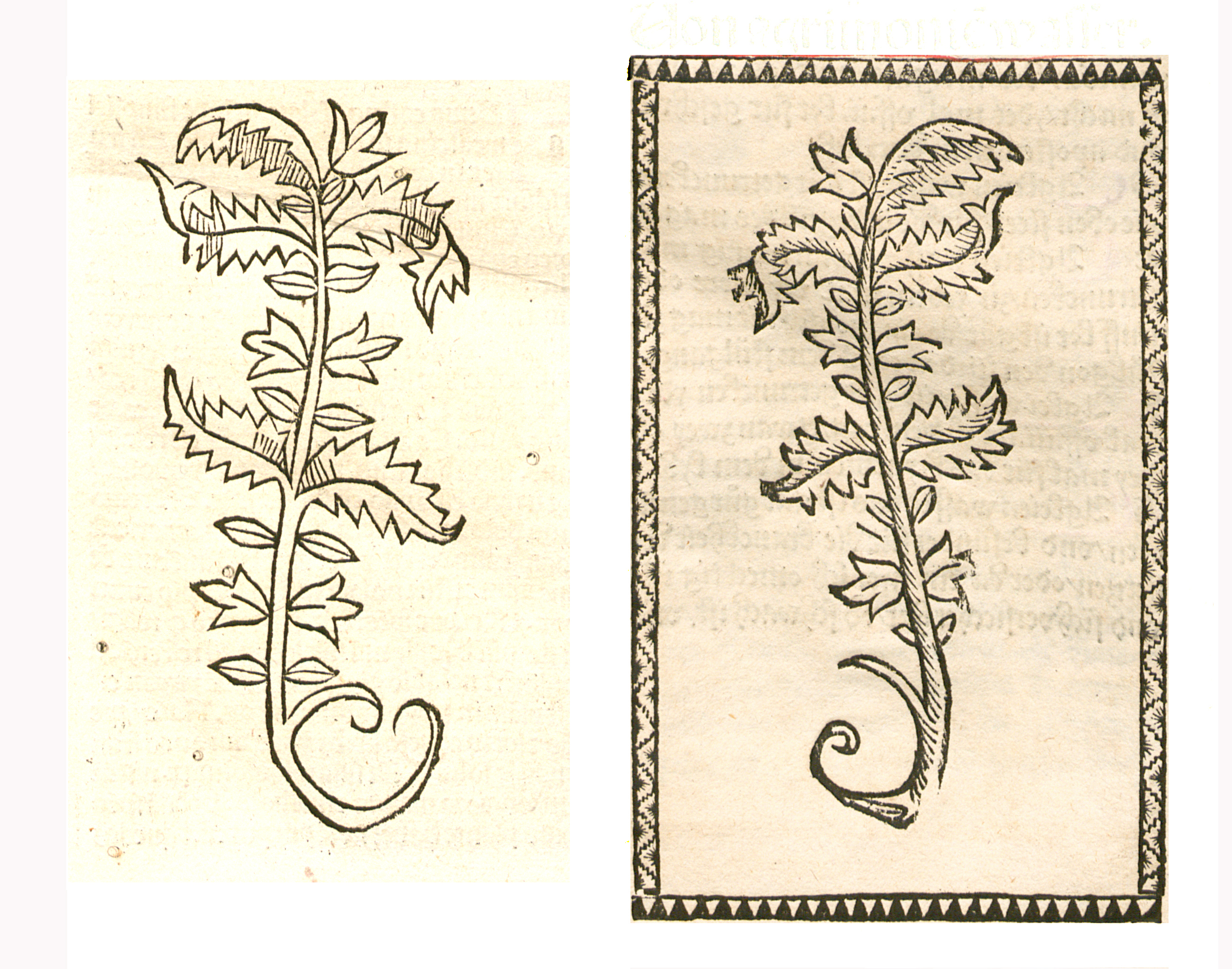 Abbildung von Agrimonien (Agrimonia eupatoria)